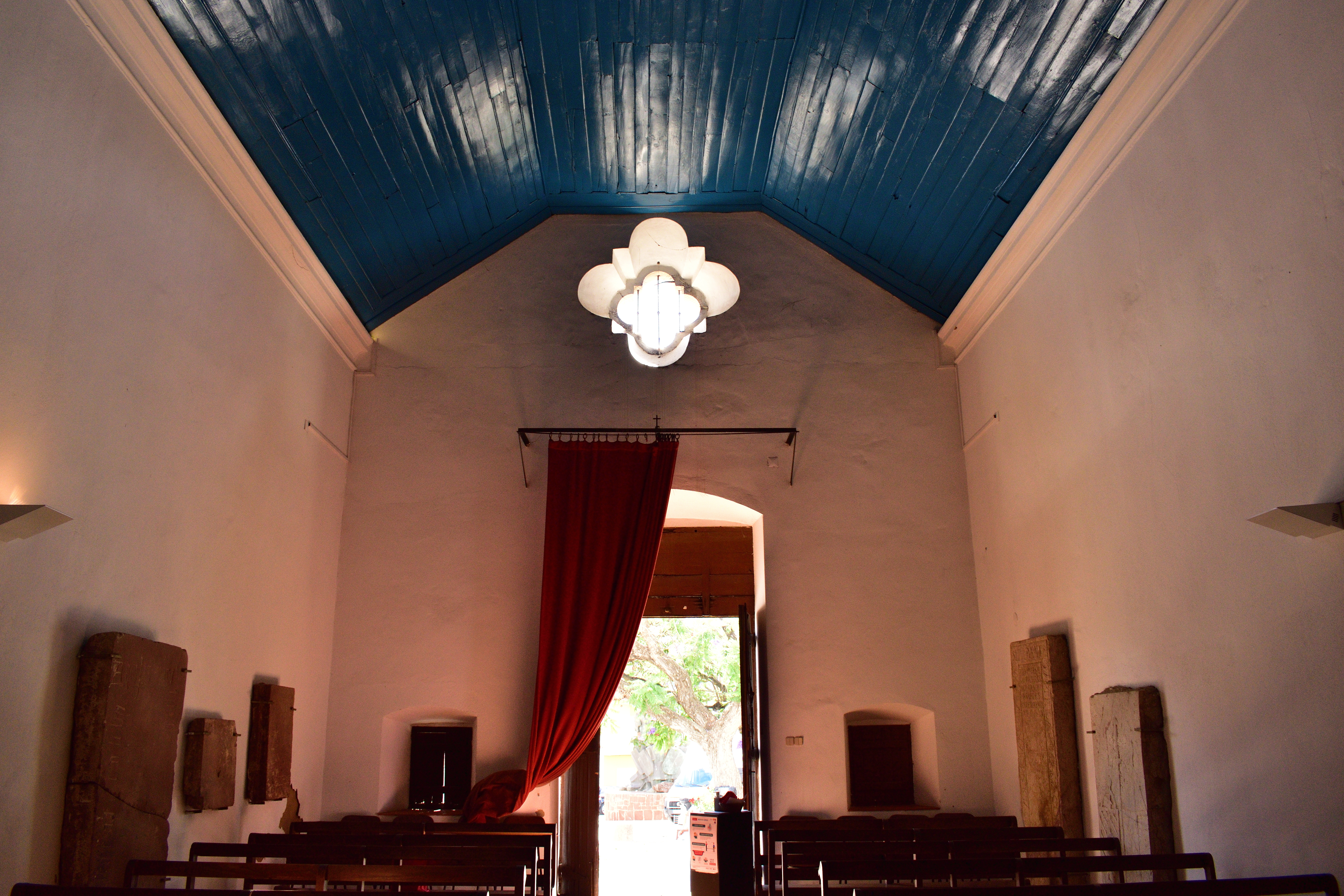 Interior da Ermida de Nossa Senhora dos Mártires, na cidade de Silves, em Portugal.